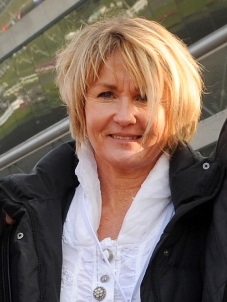 Travkuskarna (från vänster): Stig H Johansson, Helen A. Johansson och Berndt Lindstedt.